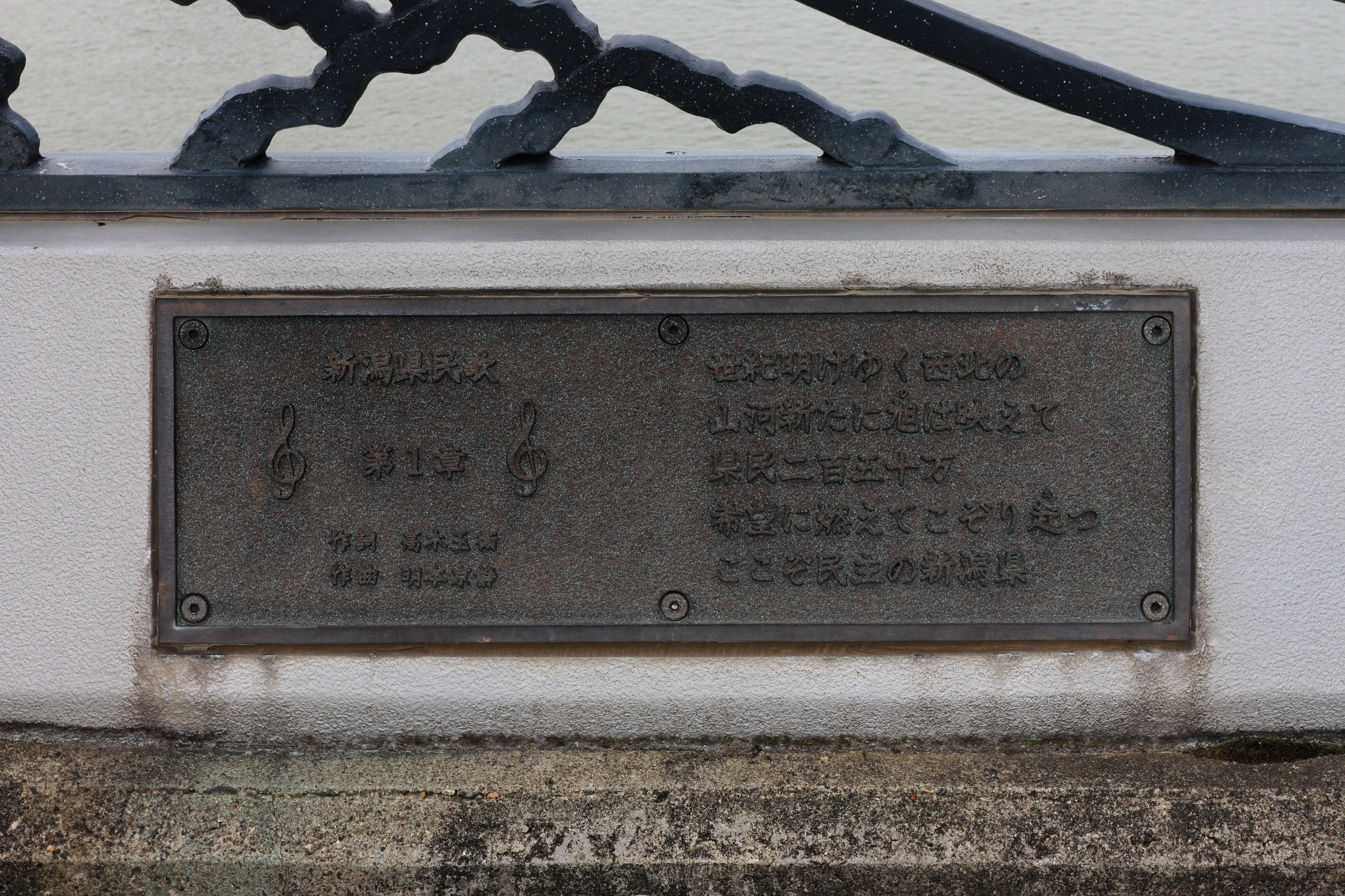 千歳大橋に設置されている新潟県民歌第1章のレリーフ